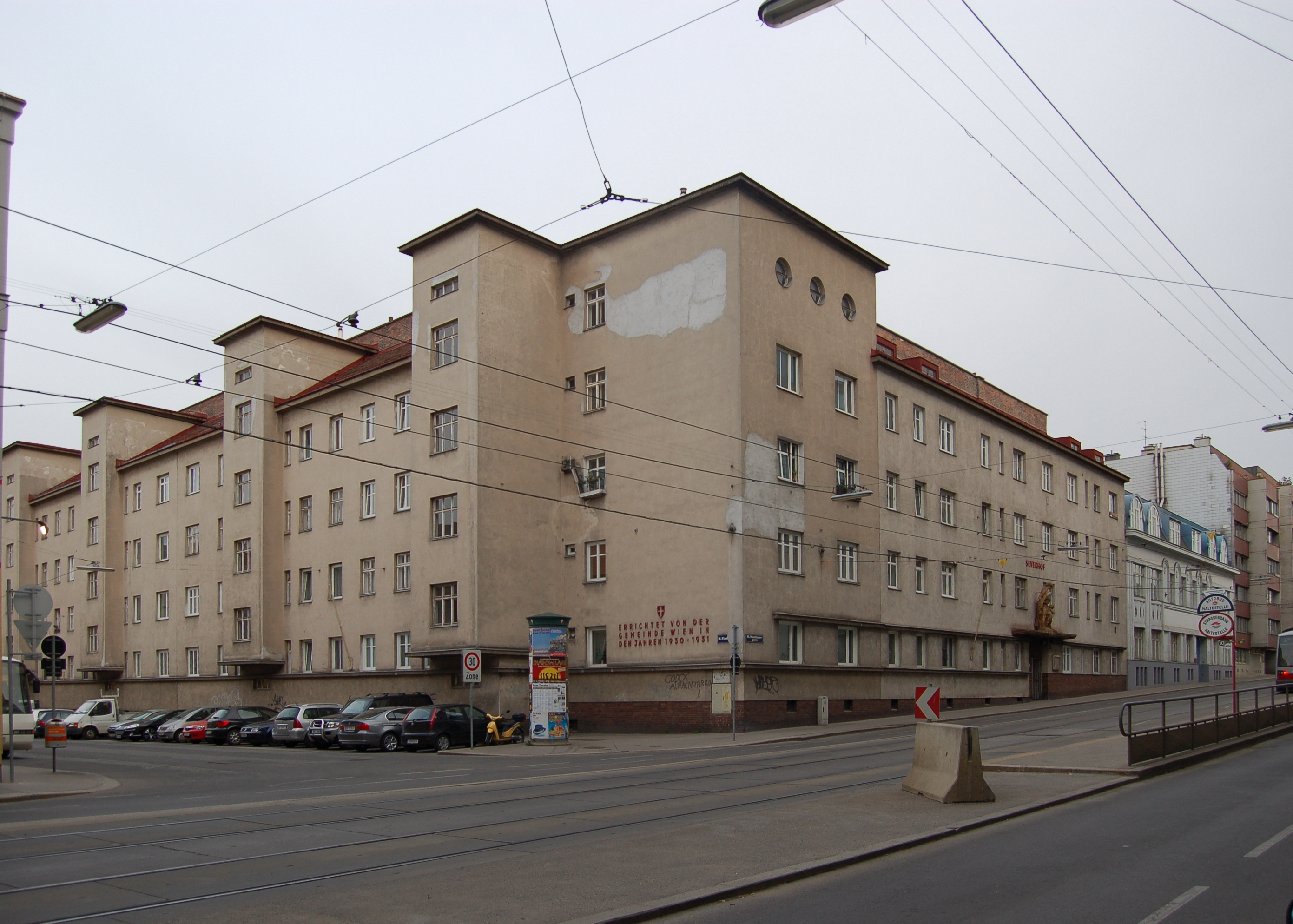 Der Sever-Hof in Wien-Ottakring (Maroltingergasse 56-58). Außenfassade an der Maroltingergasse/Wiesberggasse.